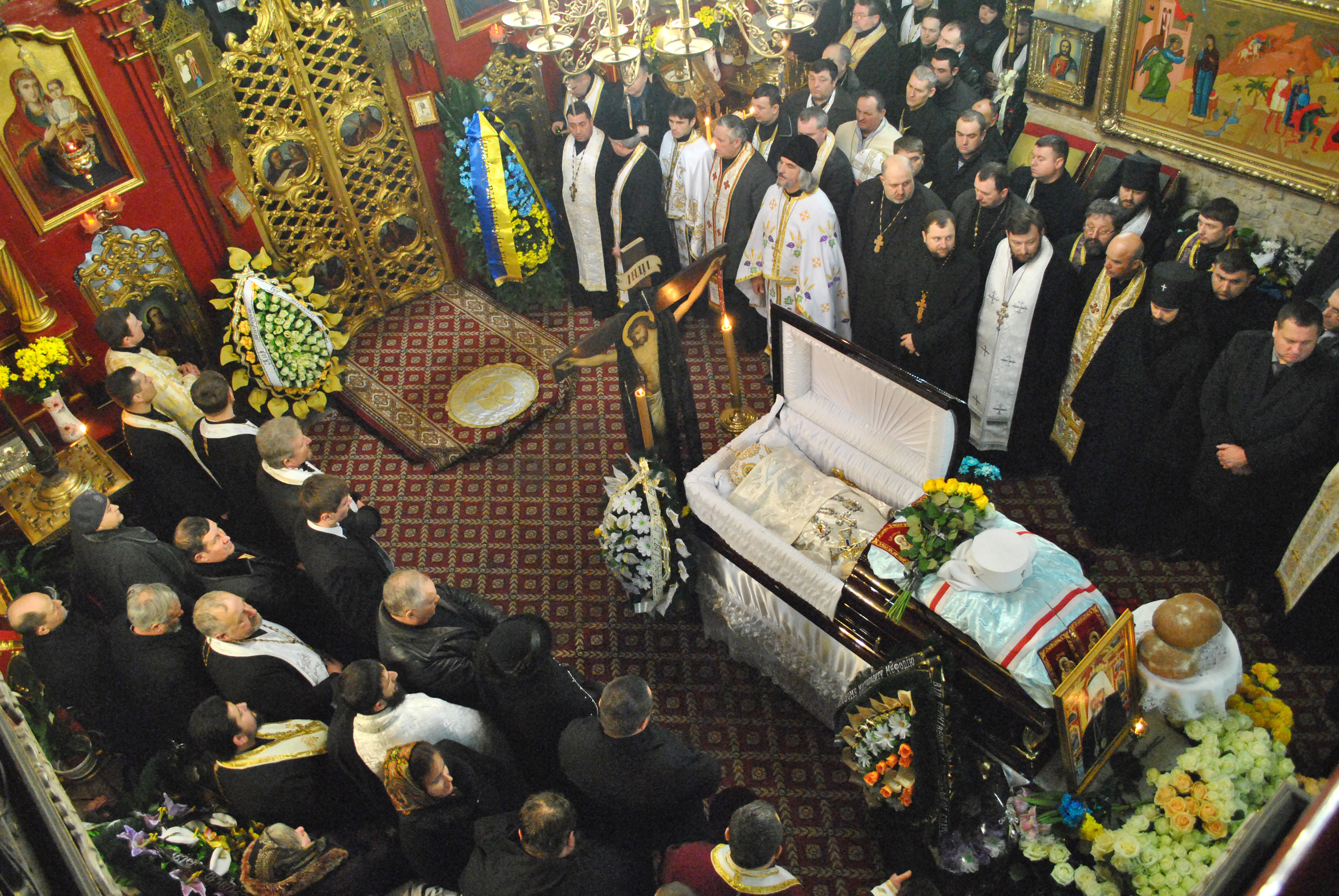 Похорон предстоятеля Української автокефальної православної церкви, Митрополита Київського і всієї України Мефодія в церкві Різдва Христового (м. Тернопіль).